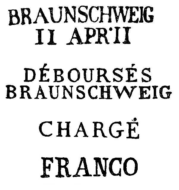 Darstellung der Stempelformen, wie sie in der Zeit des Königreichs Westfalen eingeführt worden waren.